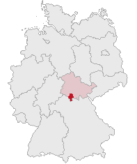 Landkreis Hildburghausen, Thuringia, Germany